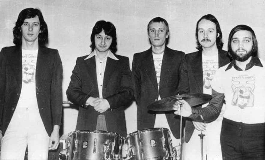 Группа "Цветы", состав 1976 года: Константин Никольский, Стас Намин, В. Сахаров, Алик Микоян, Юрий Фокин.